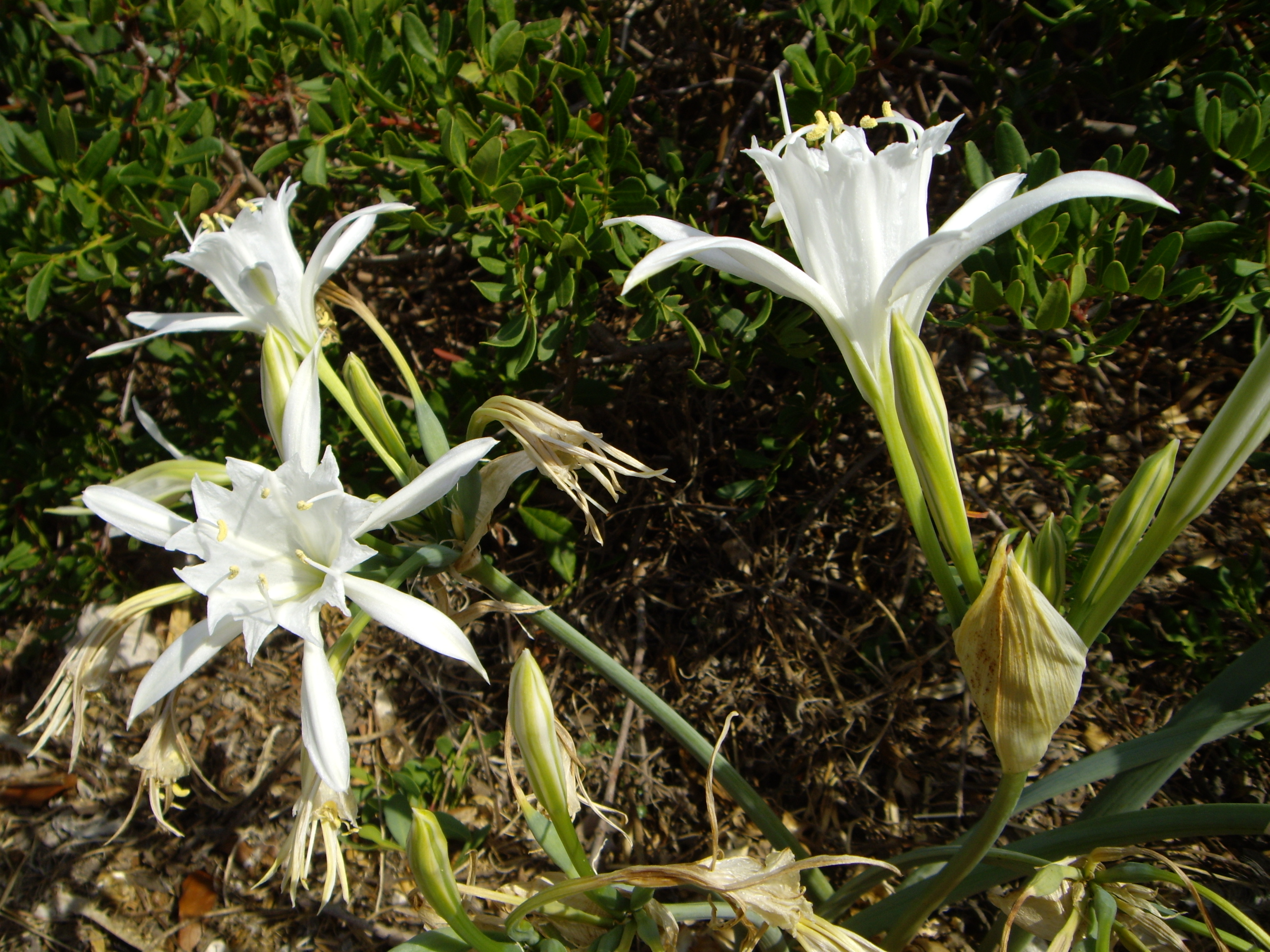 Fleurs, sur l'île de Riou, France.